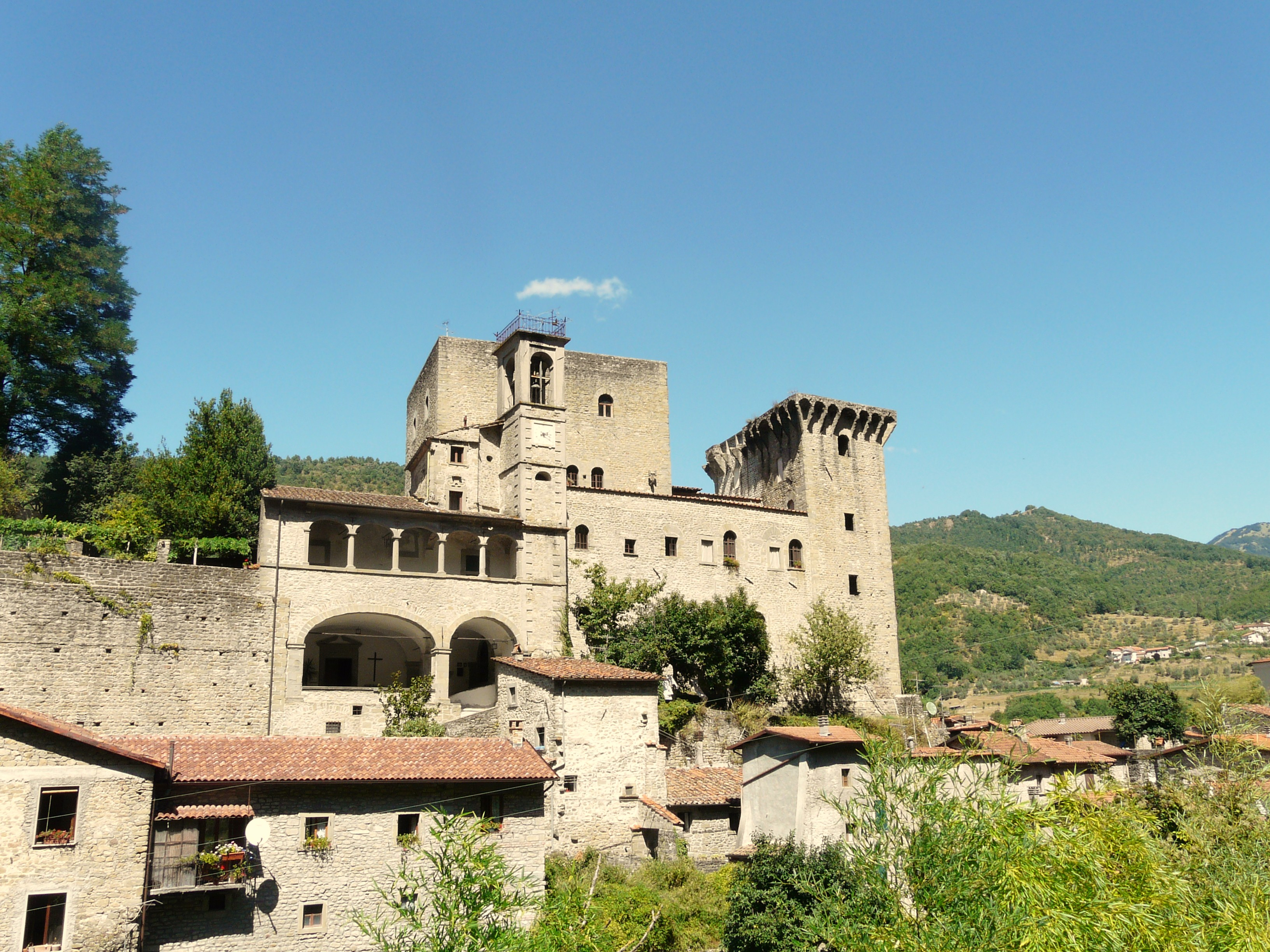 Fortezza della Verrucola dei Bosi, Fivizzano, Toscana, Italia